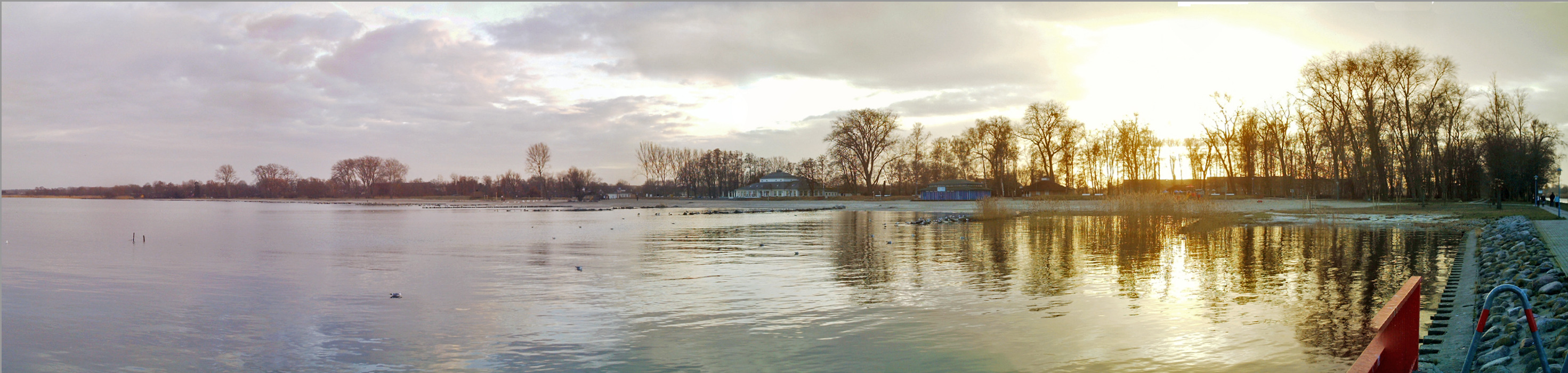 Der Ueckermünder Strand Weihnachten 2008